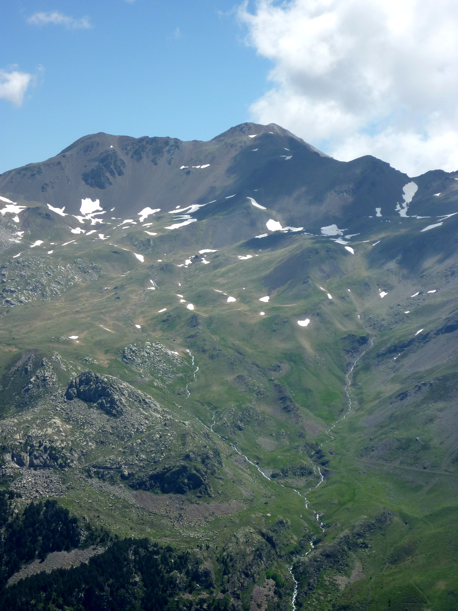 El Montorroio i la Coma d'Espòs des del camí de la Collda de Fontsobirana